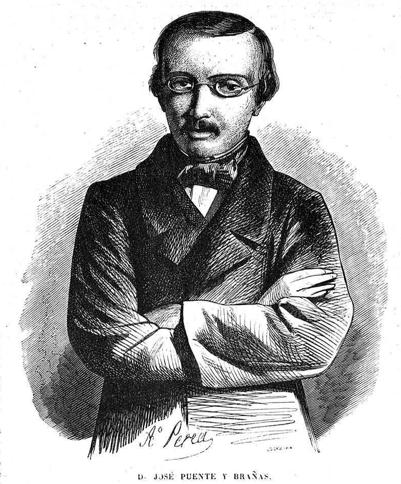 José Puente y Brañas, en la revista española El Museo Universal.